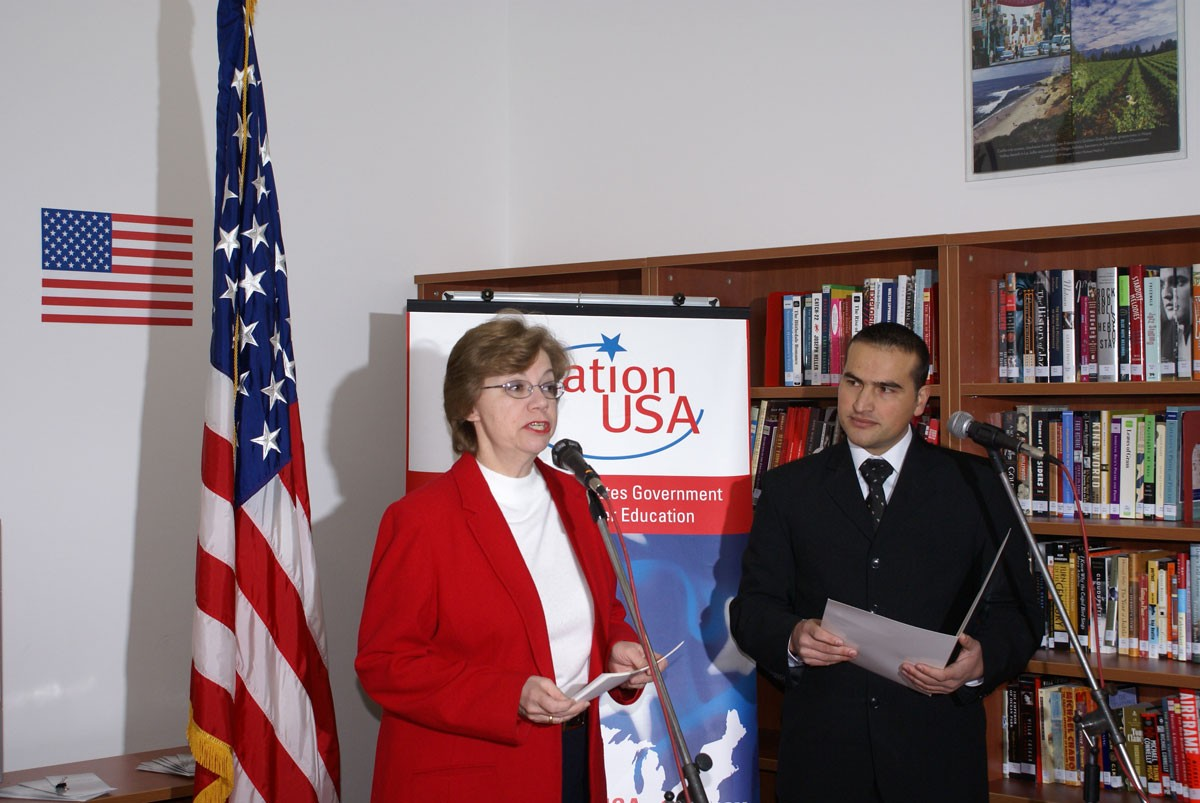 Поздравно обраќање на Амб. Миловановиќ и Гзим Сулејмани на официјалното отварање американсктото катче во Тетово